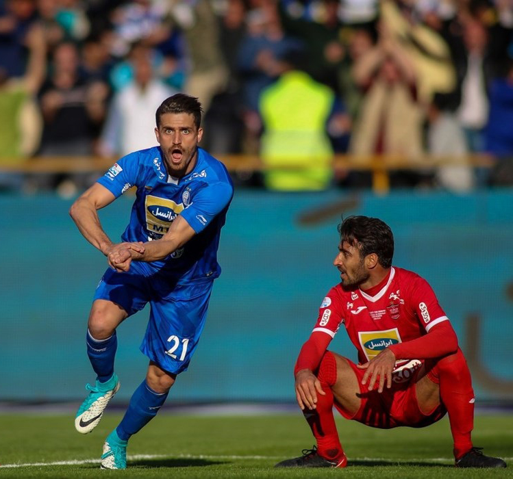 گزارش تصویری از پیروزی استقلال مقابل پرسپولیس در دربی 86 (بخش سوم)